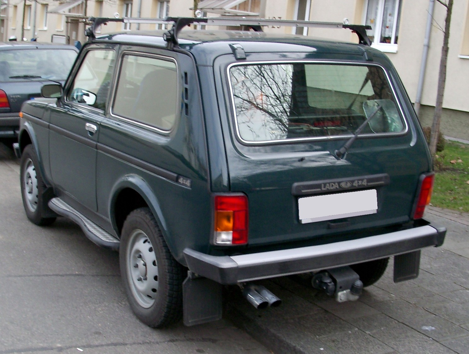 Lada Niva Facelift